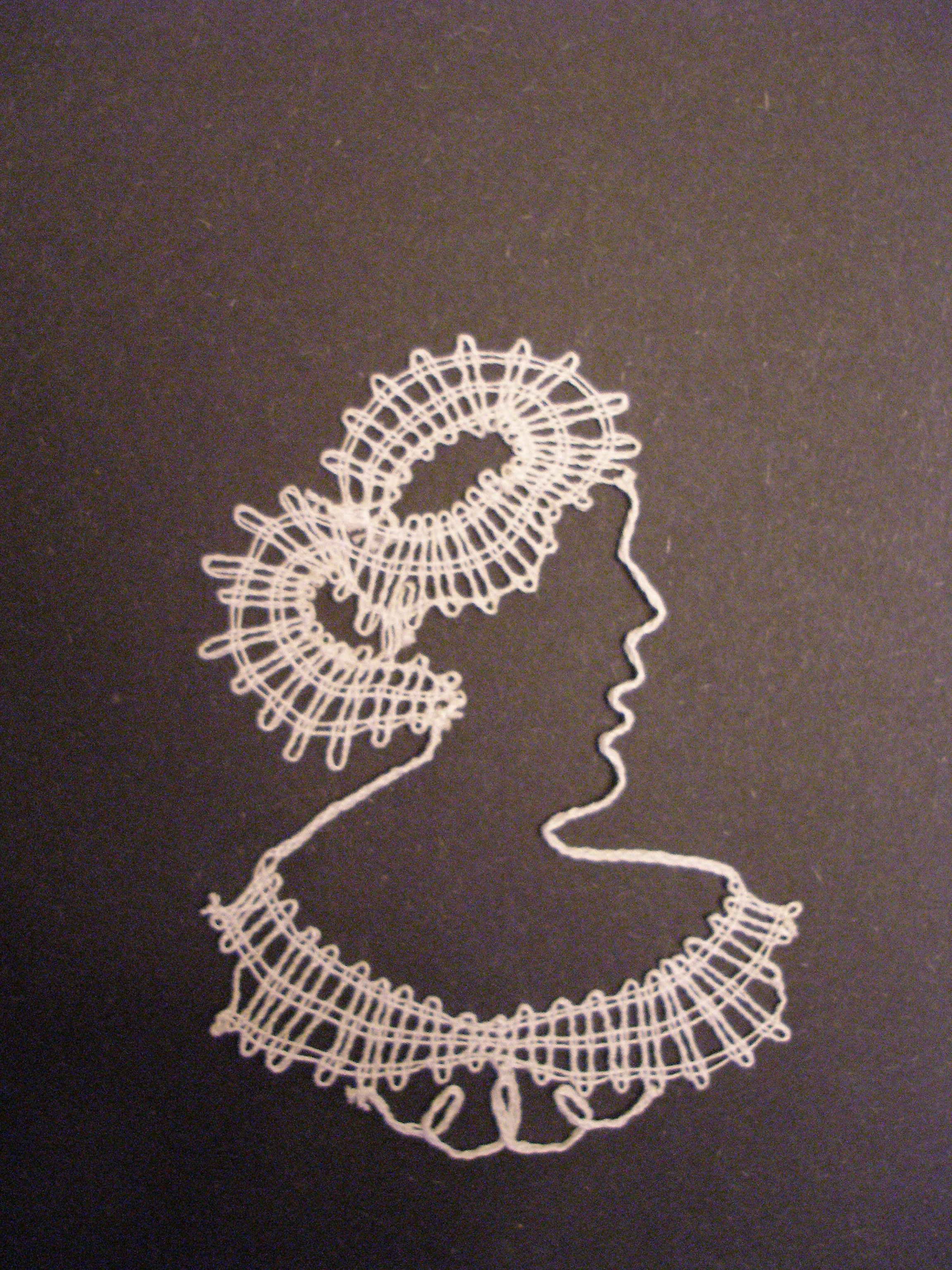 M.Ringerová:solivarská čipka